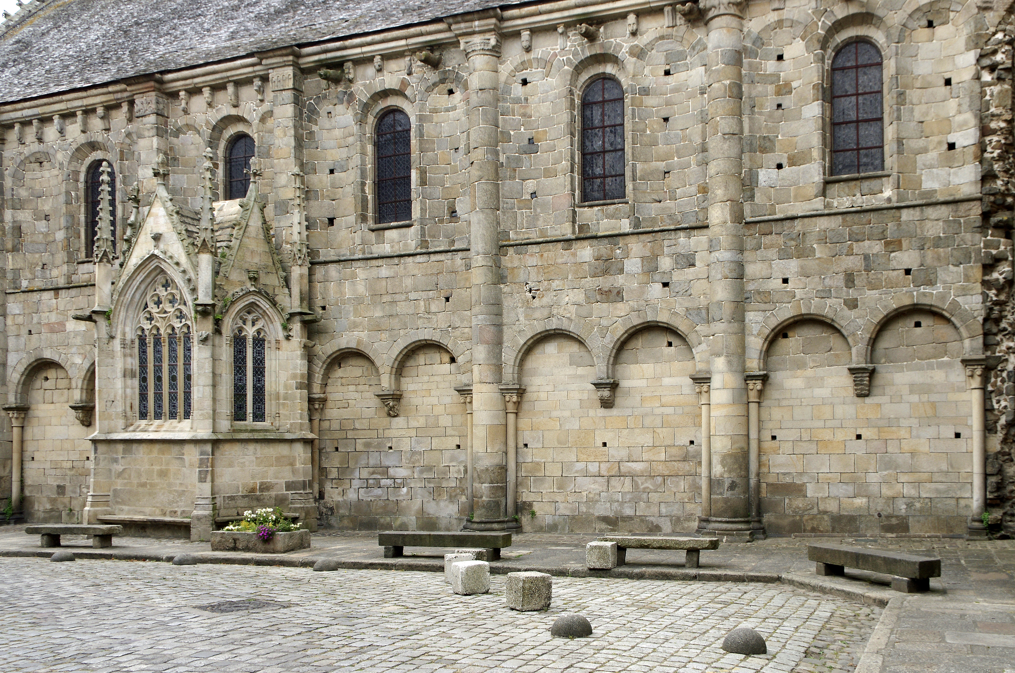 Basilique Saint-Sauveur. La façade sud. La tradition attribue à Rivallon Le Roux, seigneur de Dinan, revenu de croisade, la fondation en 1112, à proximité du château primitif, d'un prieuré, cédé à l'abbaye de Saint-Jacut. La façade ouest et le mur sud, qui subsistent de l'église primitive, sont de style romano-byzantin et datent du XIIème siècle. La façade sud est divisée en six travées séparées par des contreforts en colonnes et pilastres. Le mur de chaque travées est séparé horizontalement par un cordon horizontal. La façade est allégée dans sa partie basse par une arcature festonnée, et dans sa partie haute par des niches encadrant des ouvertures. En haut, la corniche est supportée par des modillons. La petite chapelle sur la troisième travée a été ajoutée à la fin du XVème siècle. Une chapelle similaire à hauteur de la première travée a été supprimée au XIXe siècle.